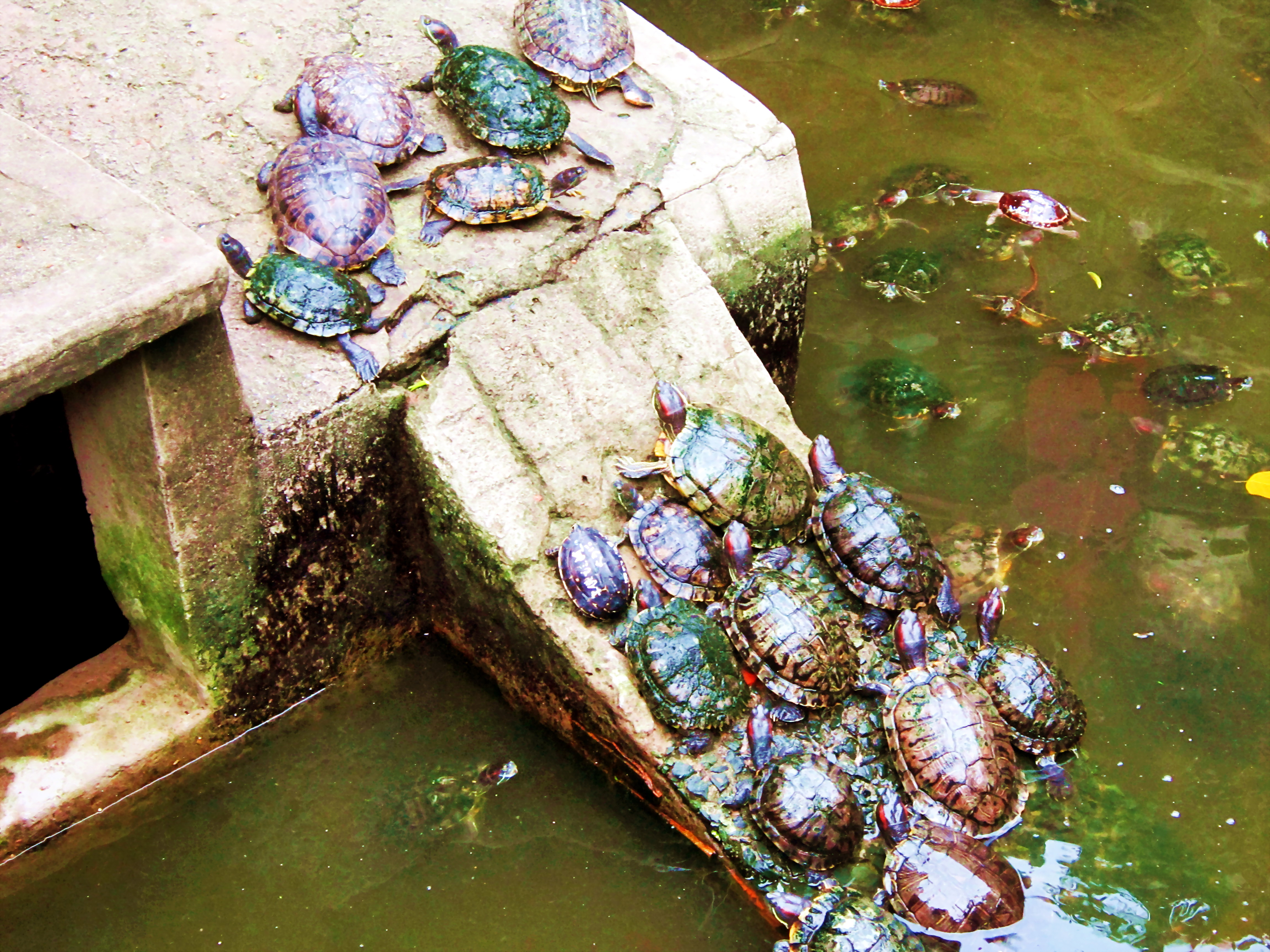 Rùa được phóng sinh tại chùa Ngọc Hoàng (TP. Hồ Chí Minh, Việt Nam).